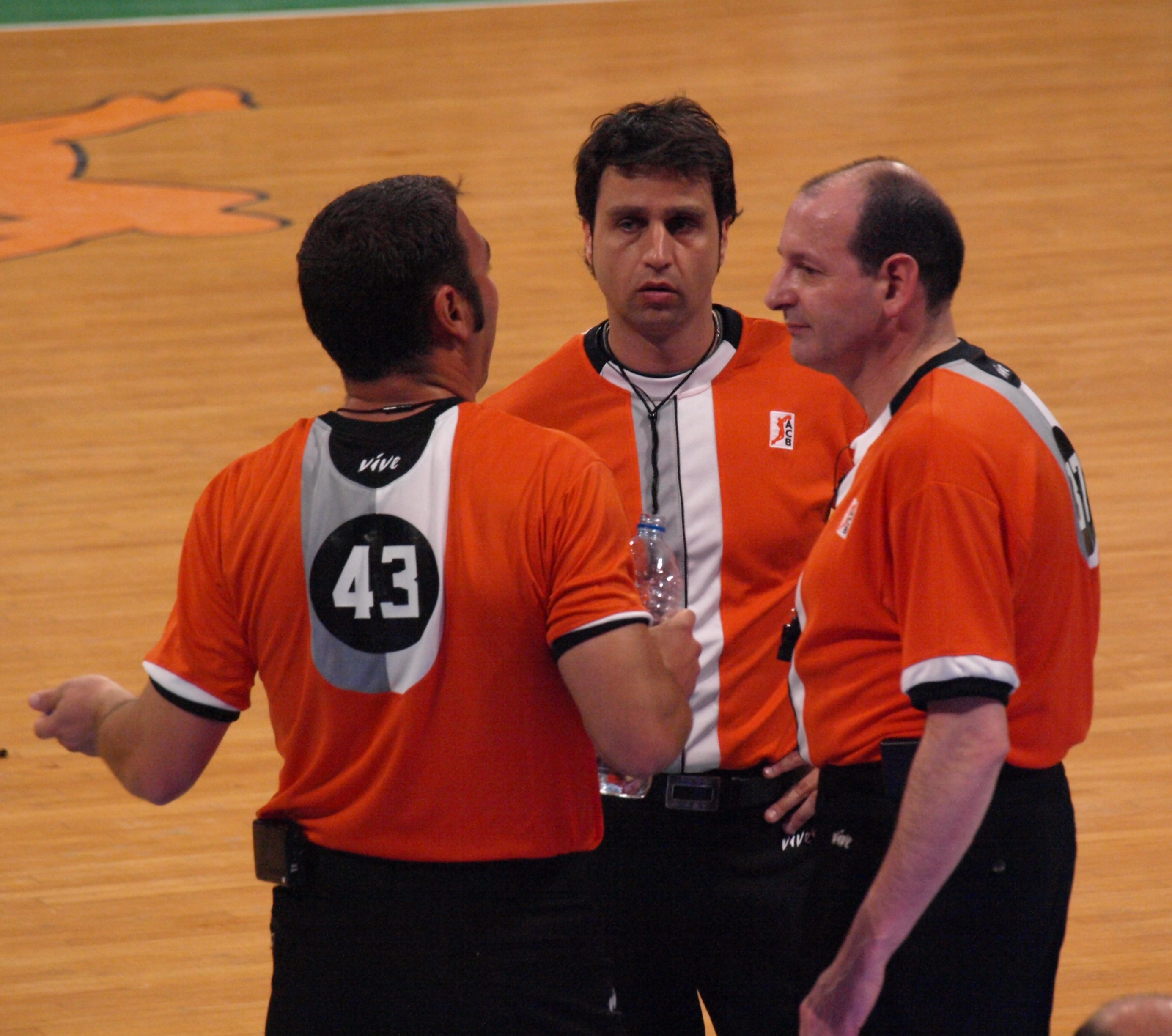 Los 3 colegiados que arbitraron el choque entre el DKV Joventut y el Iurbentia Bilbao de la liga ACB 2008/09 disputado en el Olímpico de Badalona en marzo de 2009 discuten sobre aspectos técnicos del choque durante el descanso del mismo.